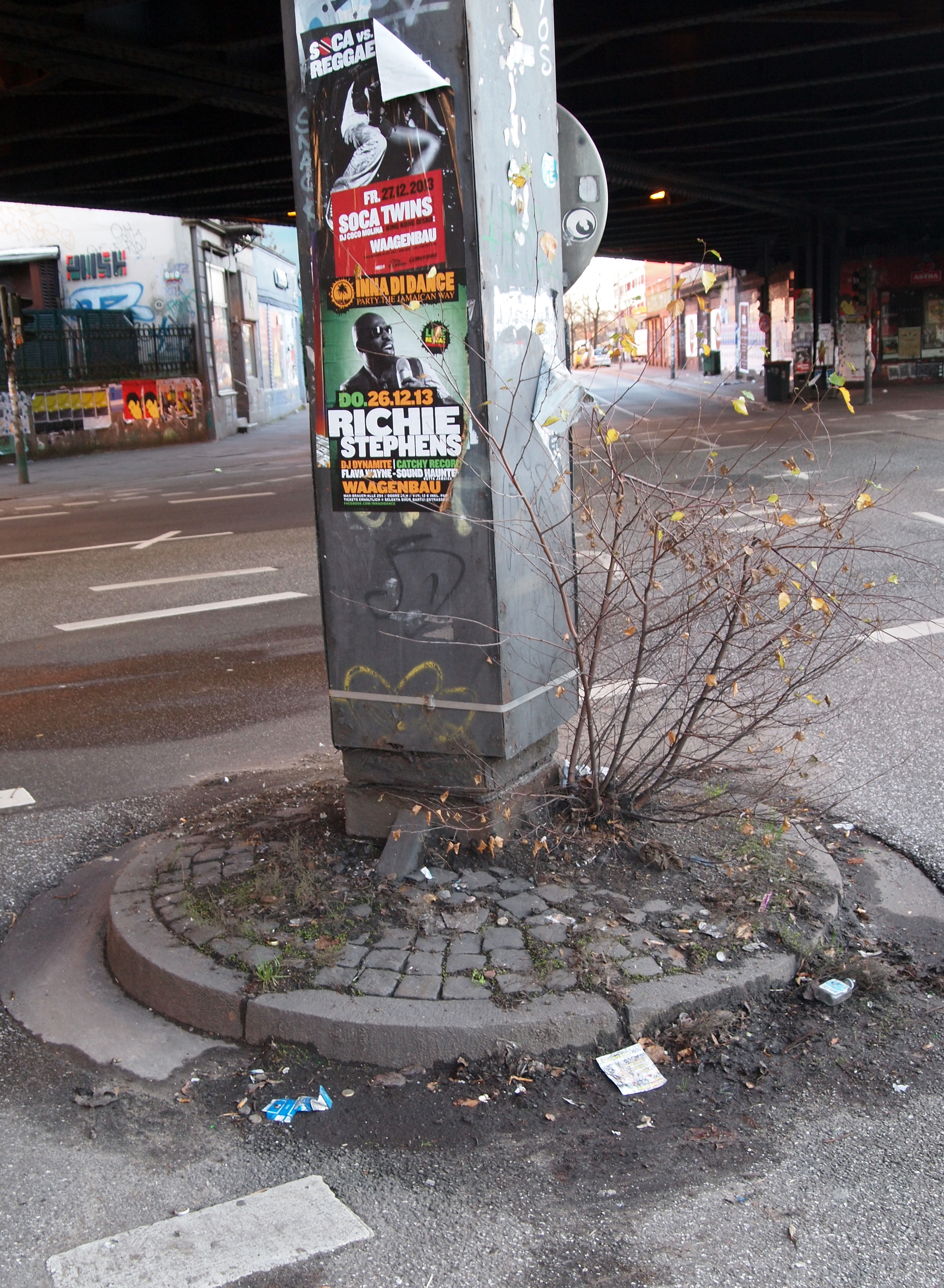 Sternbrücke Hamburg Altona Altstadt - Stresemannstraße / Max-Brauer-Allee; hier: aufgeständerter Pfeiler